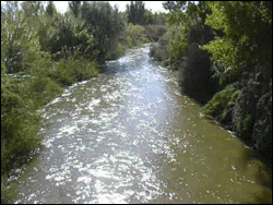 es el rio de recas